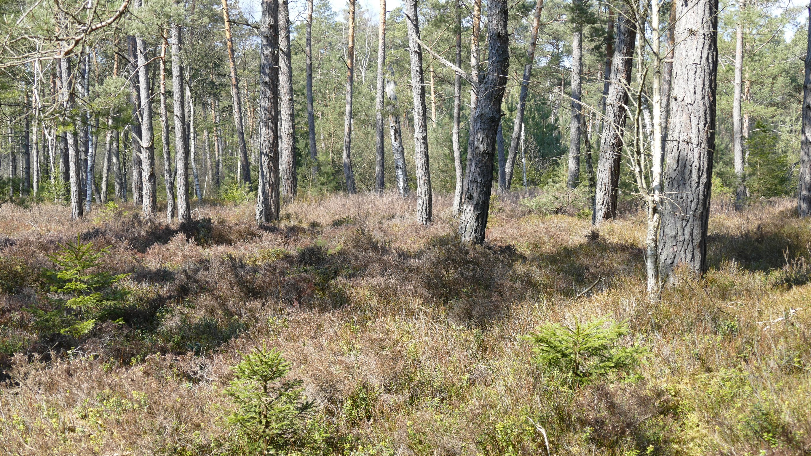 Am Entenweiher im Rotter Forst, Bayern